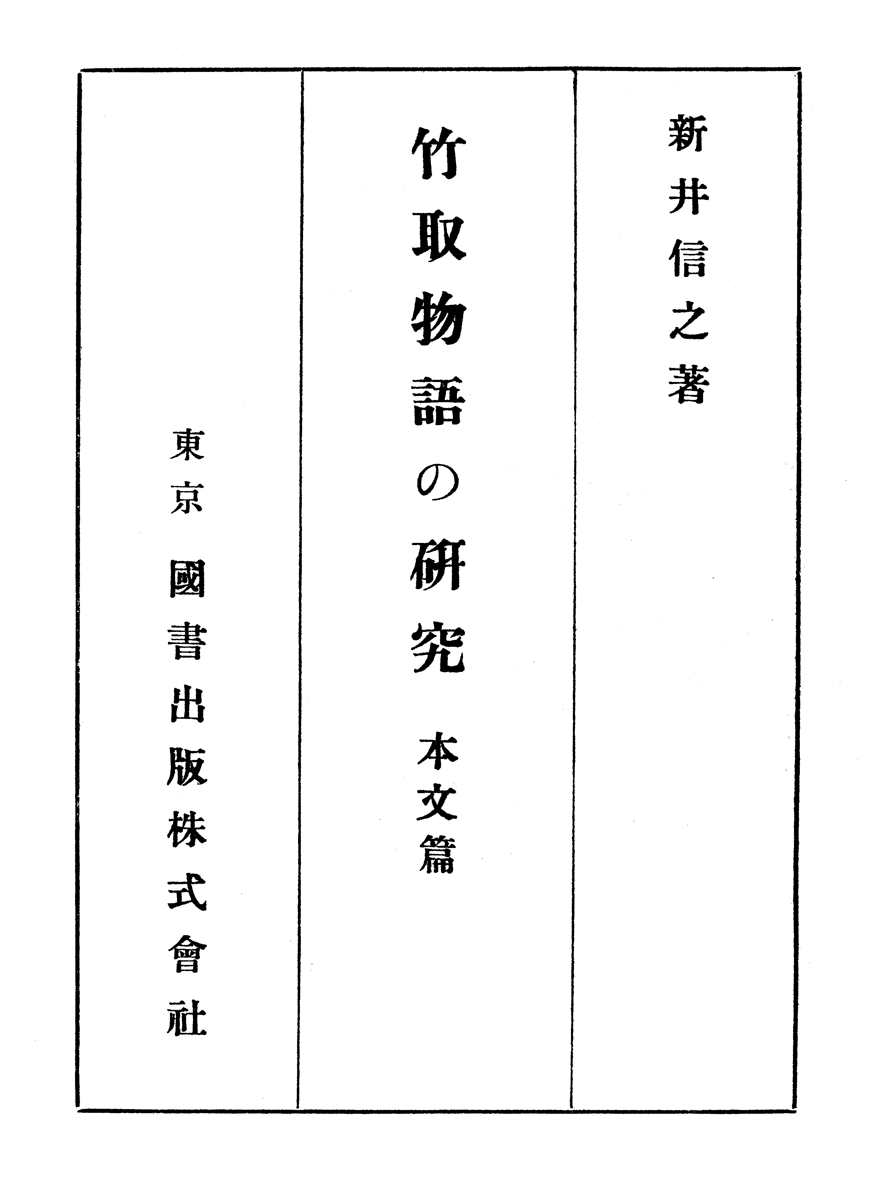 『竹取物語の研究 本文篇』より扉ページ。